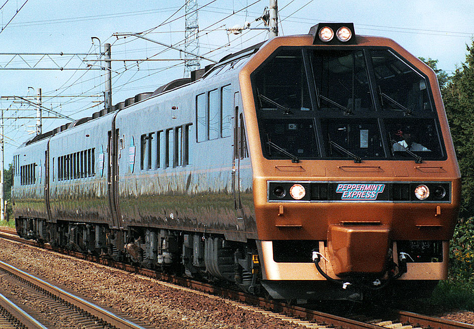 JR北海道 キハ59アルファコンチネンタルエクスプレス「ペパーミントエクスプレス」